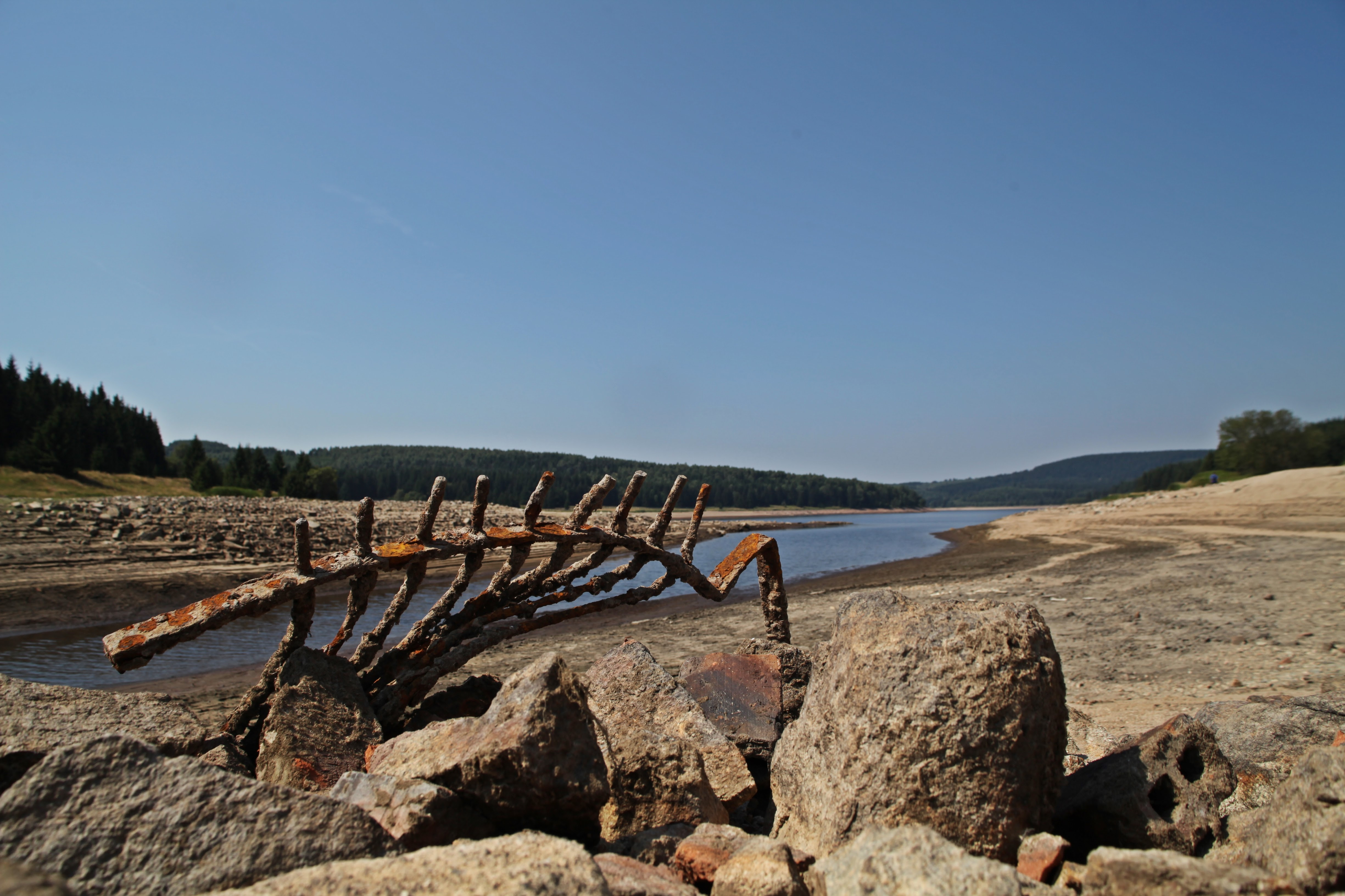 Obec Fláje - zbytky